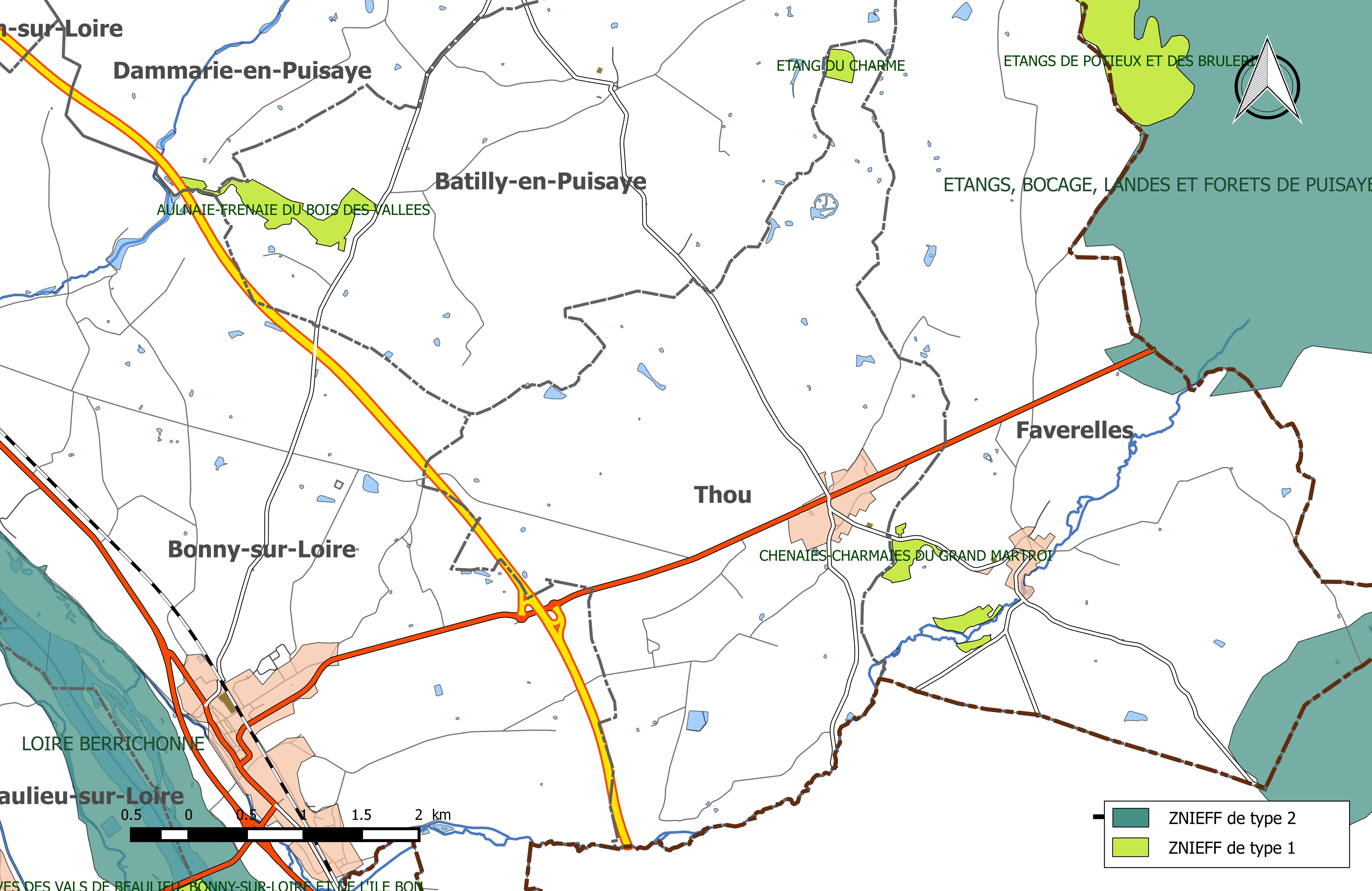 Carte des Zones naturelles d'intérêt écologique faunistique et Floristique (ZNIEFF) de la commune de Thou (Loiret).